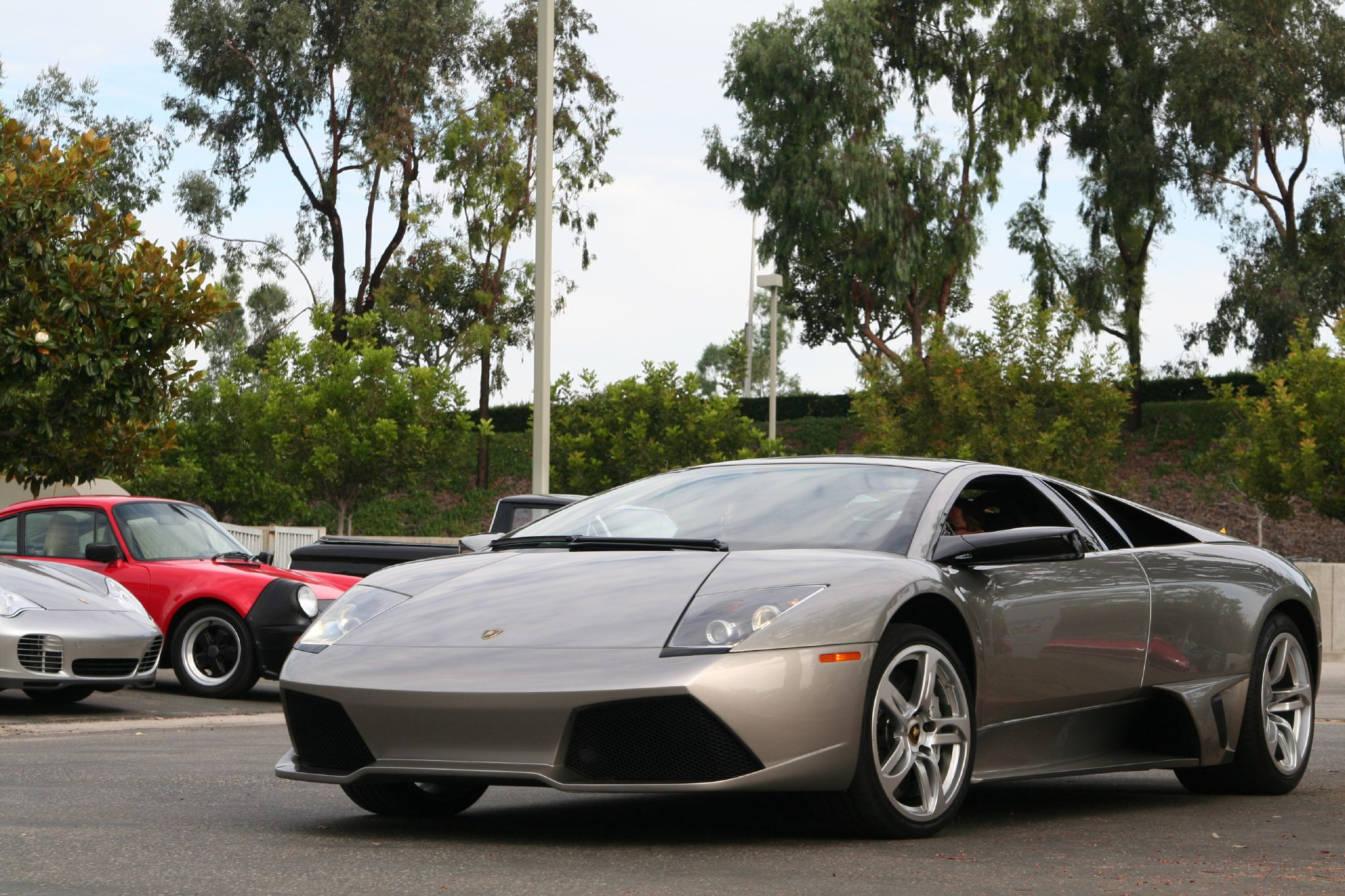 Ecru Lamborghini Murciélago